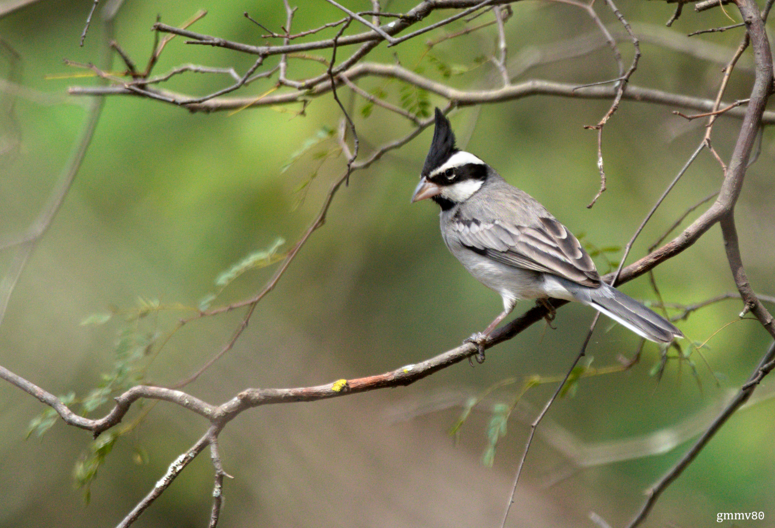 Lophospingus pusillus en el Parque Nacional Teniente Enciso, Boquerón, Paraguay. Setiembre 2019.